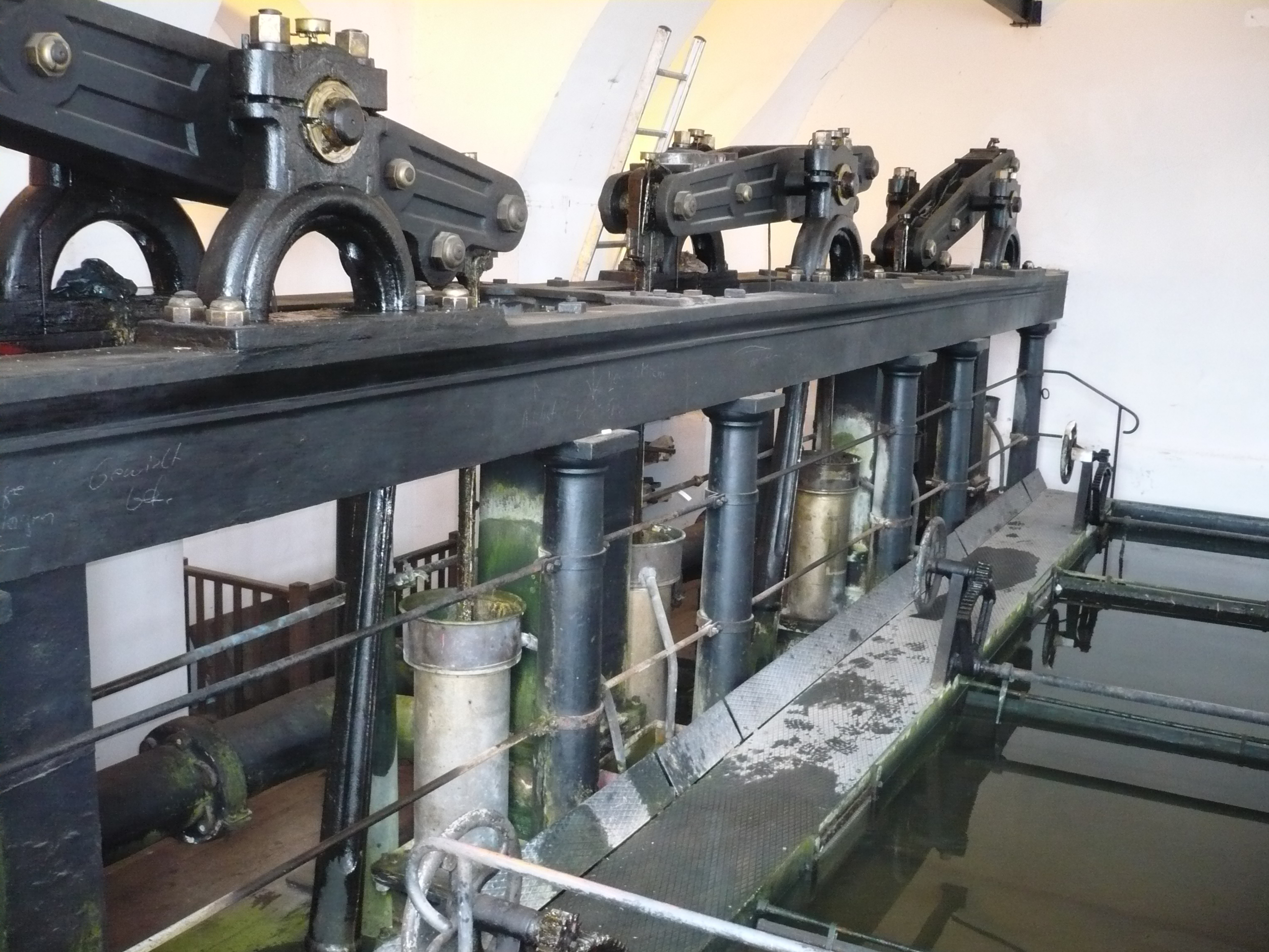 Schloss Nymphenburg mit Park. Pumpwerk im Johannisbrunnhaus.